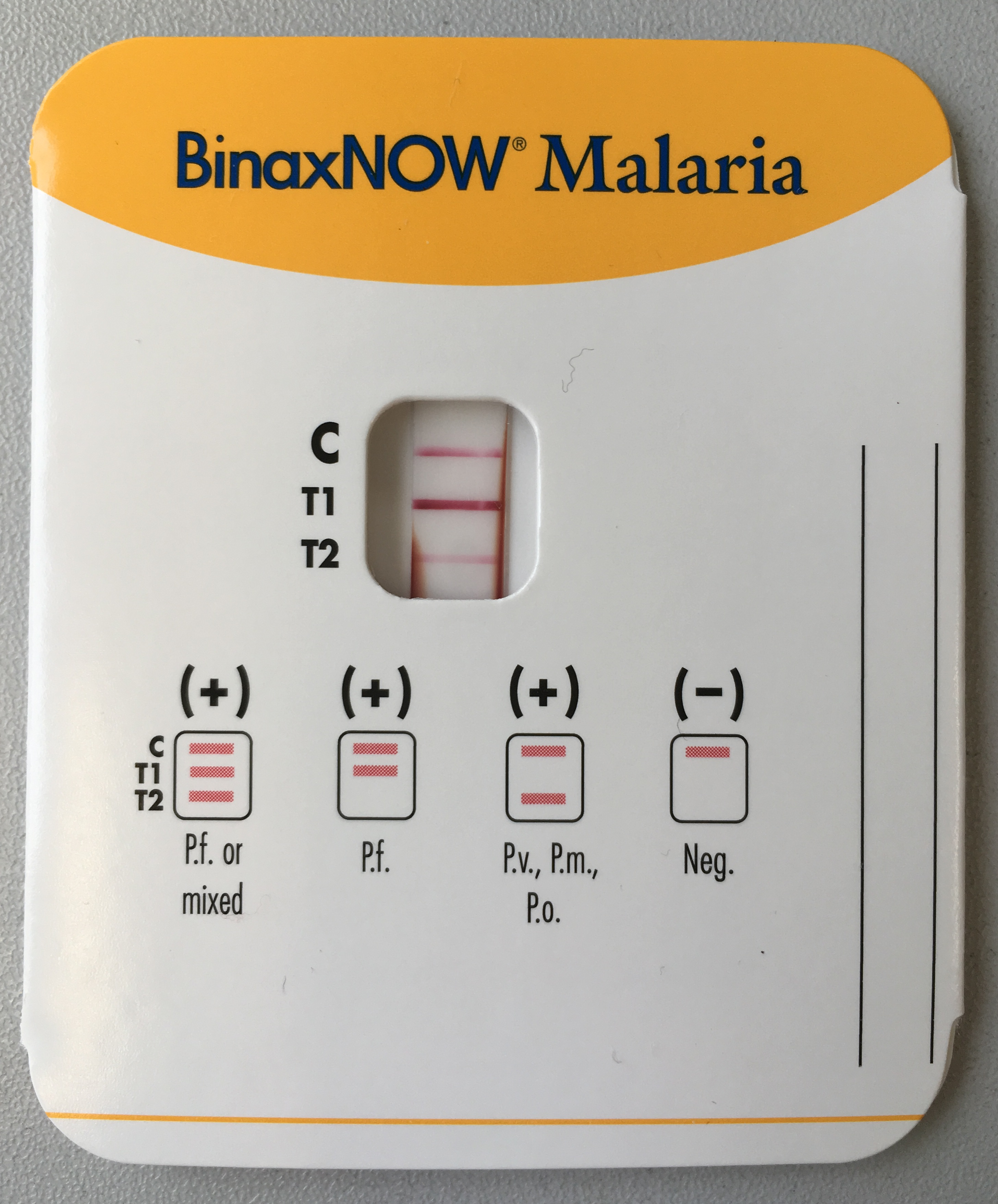 Ein Tropfen Blut wird auf einem Chromatographiestreifen aufgetrennt und Antigene nachgewiesen. C = Postitivkontrolle